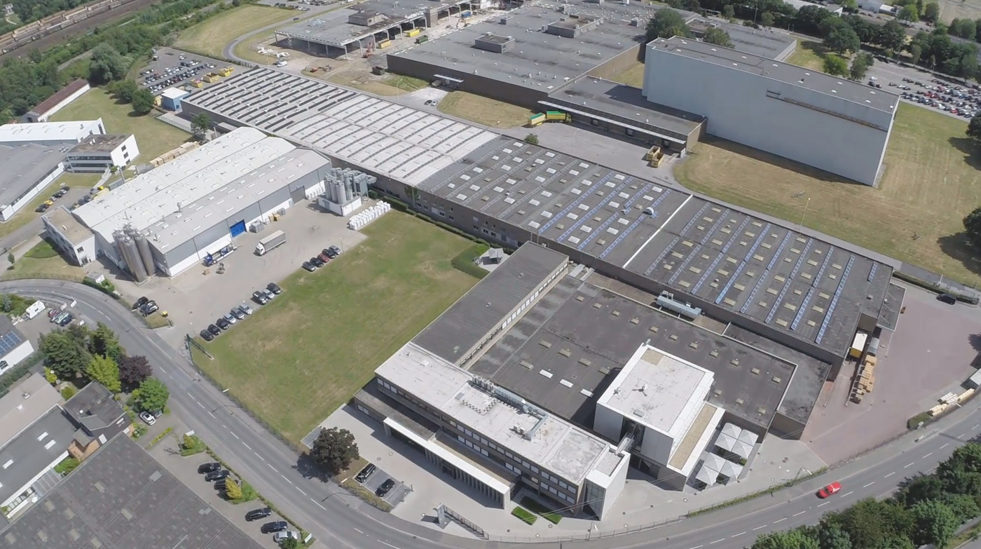 Werksgelände der Murtfeldt Kunststoffe GmbH & Co. KG. Im hinteren Bereich das neu hinzugekommene Werksgelände der ehemaligen van Netten Schokoladenfabrik in Dortmund-Brackel